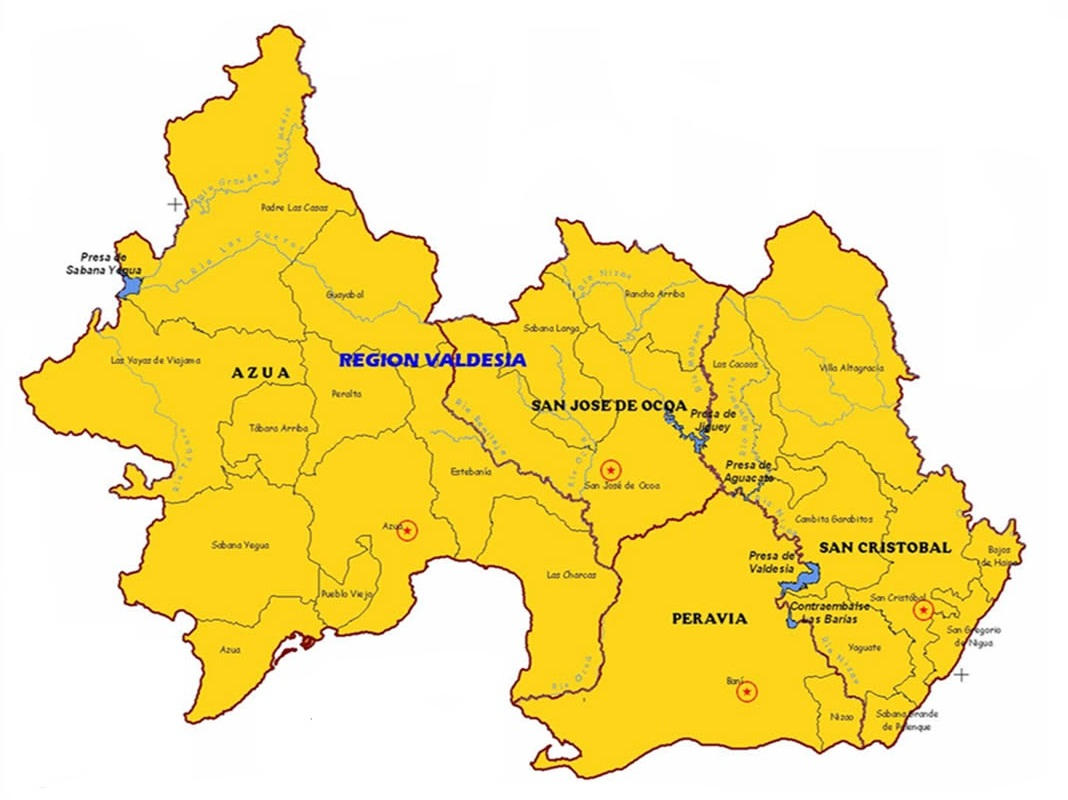 Mapa Región de Valdesia